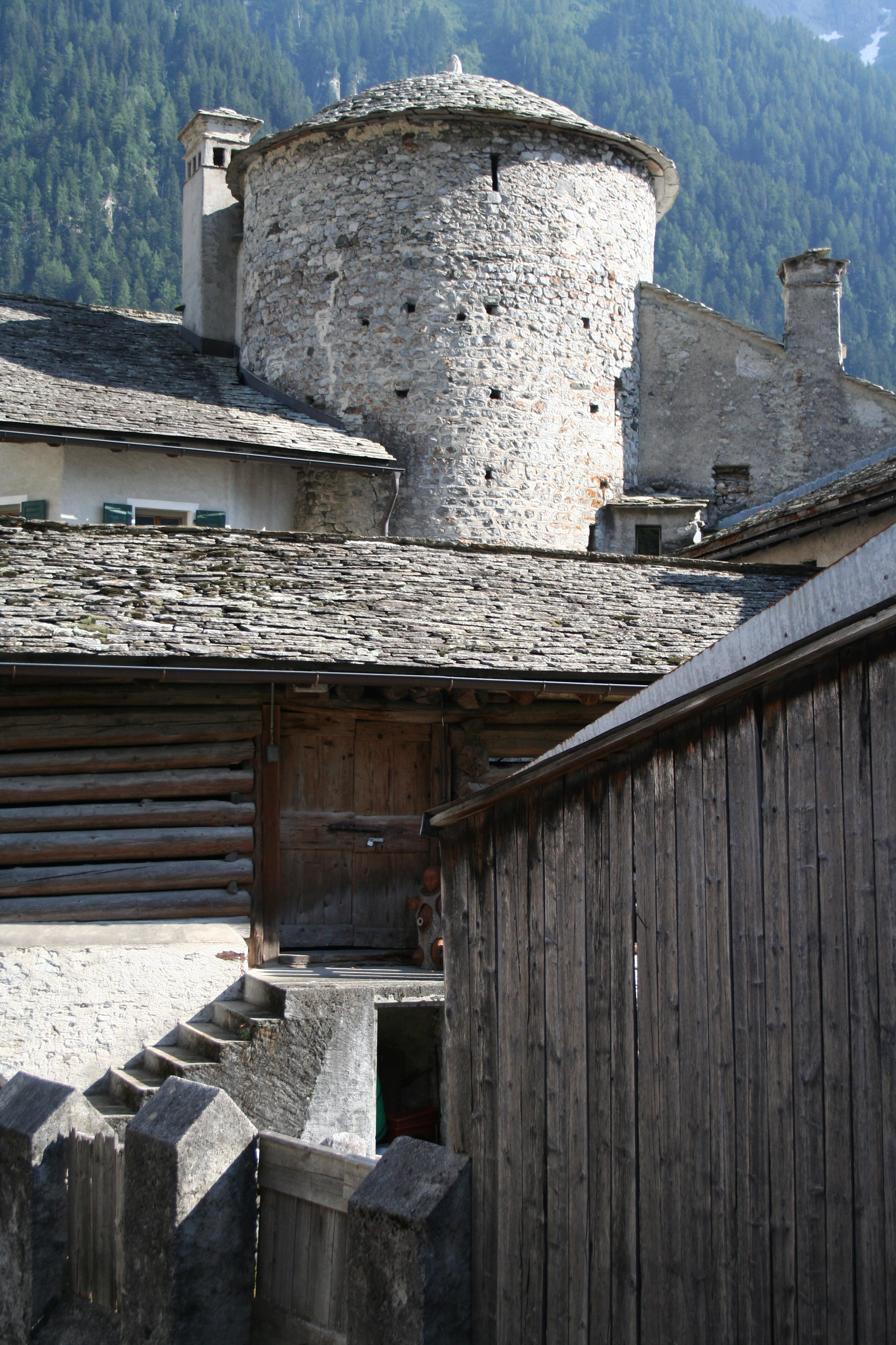 Senwelenturm in Vicosoprano, Rückseite